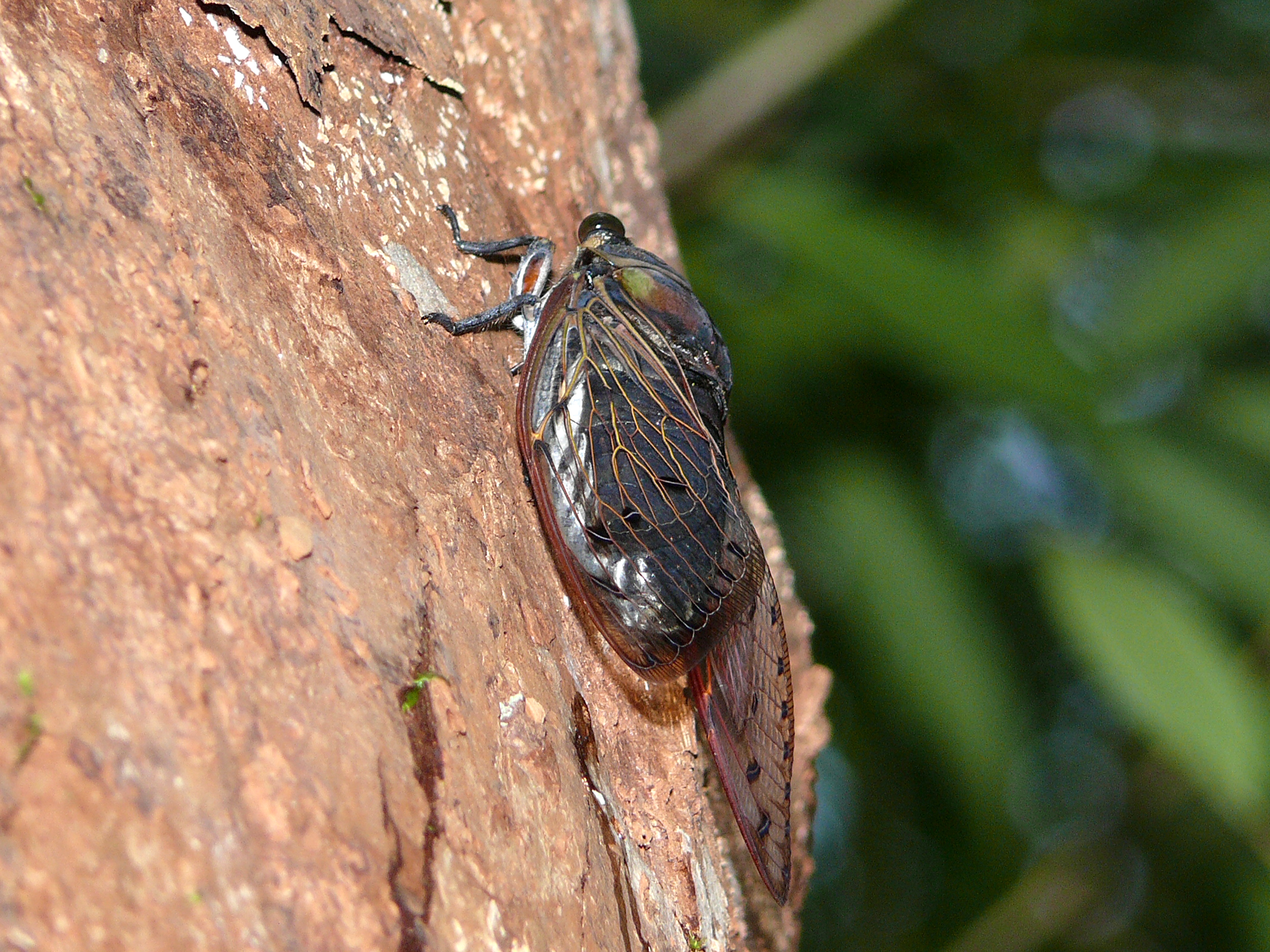 Similajau NP, Sarawak, MALAYSIA